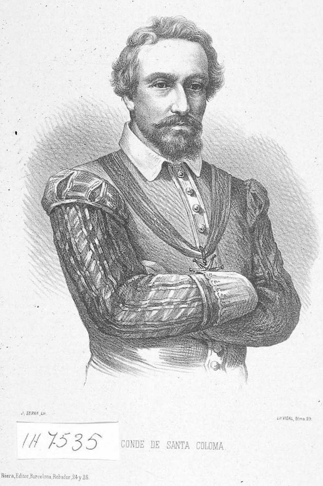 Conde Santa Coloma, litografía de Juan Serra para la Historia de España ilustrada, desde su fundación hasta nuestros días de Rafael del Castillo, Barcelona, Heredero de Pablo Riera, 1875-Biblioteca Nacional de España